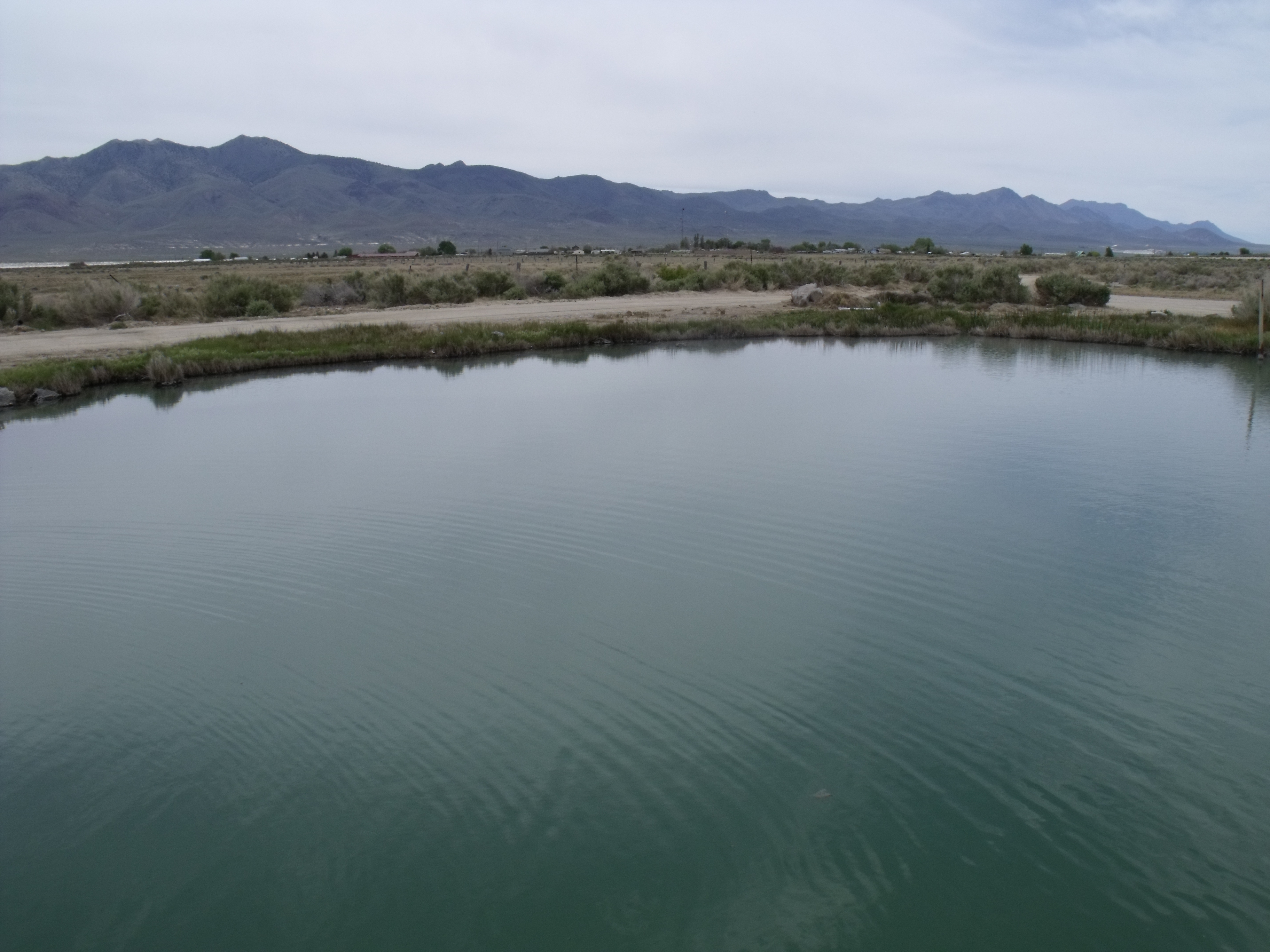 Hot spring in Gerlach, Nevada